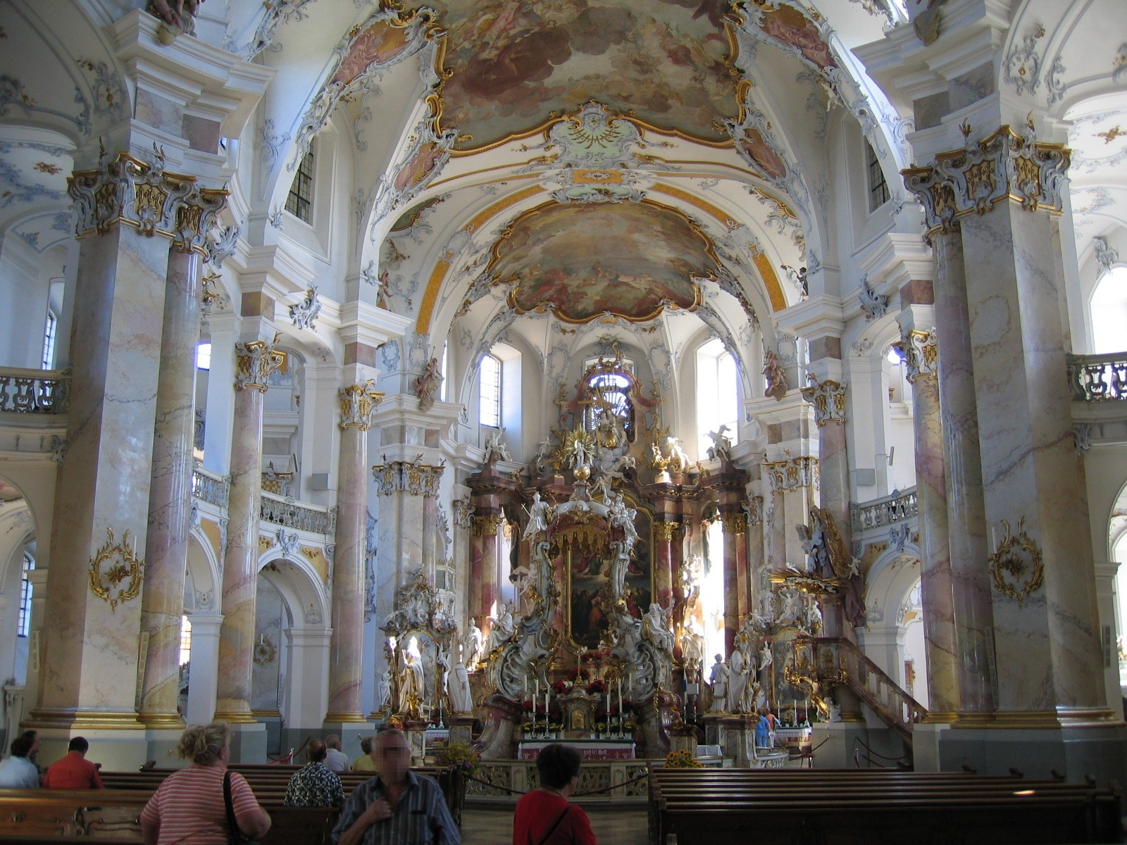 Innenansicht Basilika Vierzehnheiligen.